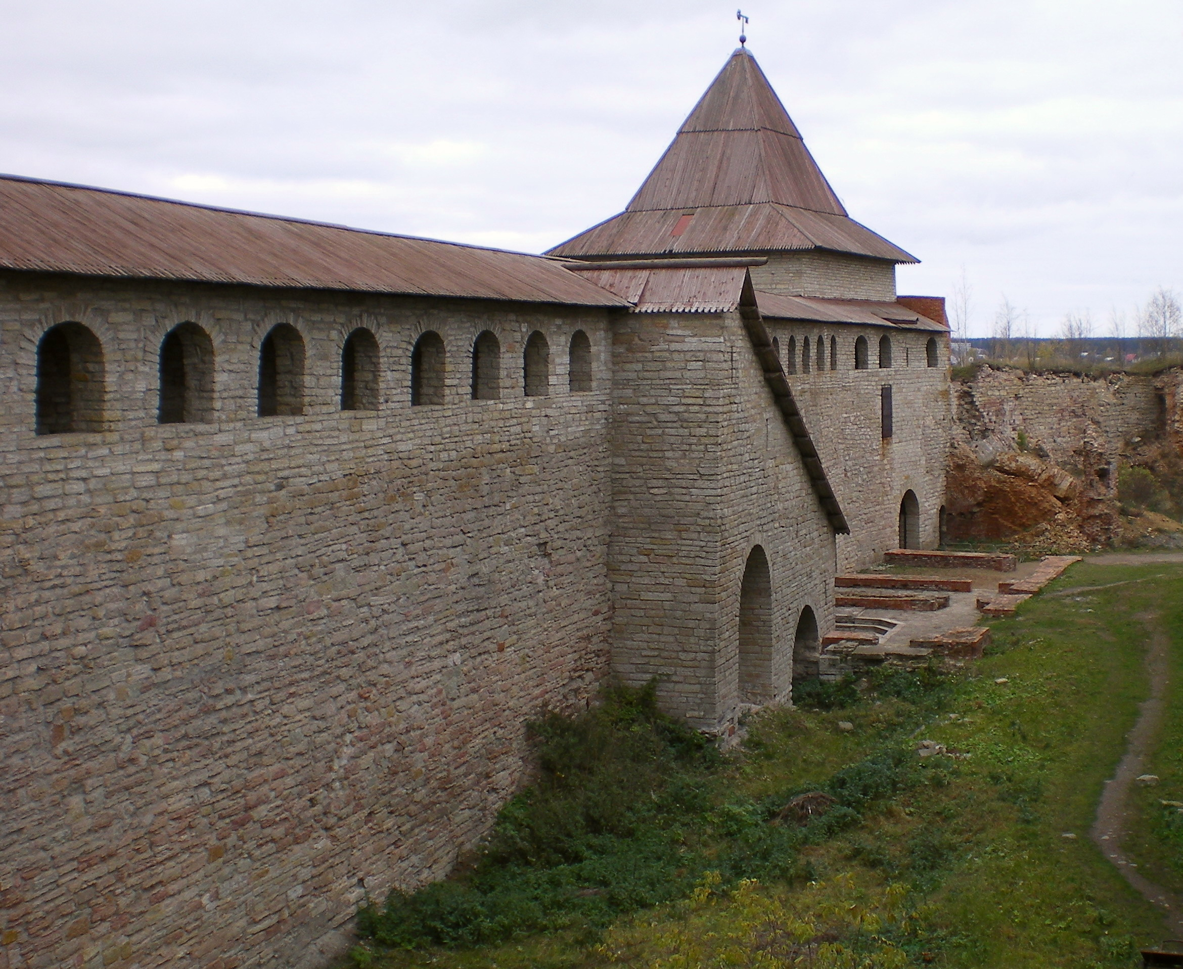 Крепость Орешек. Вид с крепостной стены на Государеву башню.